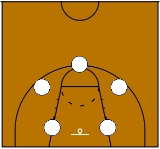 Basketball Zone Defense